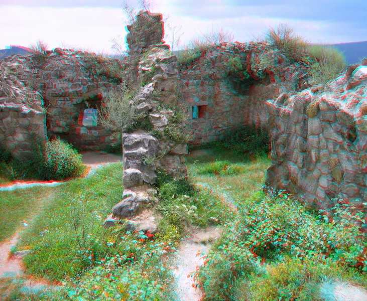 3D - Sirok - Hungary - Europe